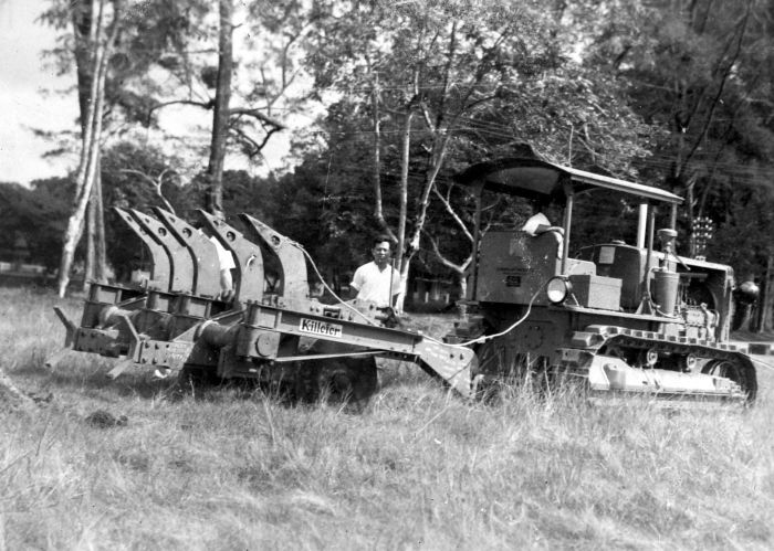 Repronegatief. Een boer bewerkt de grond met een R.O.6 bulldozer en een Killefer ripper